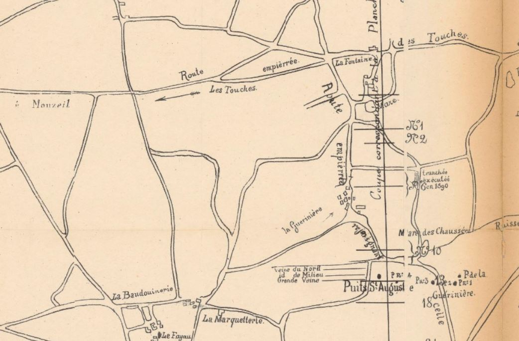 Plan de la concession des mines de houilles des Touches, détail du puits Saint-Auguste en Les Touches.